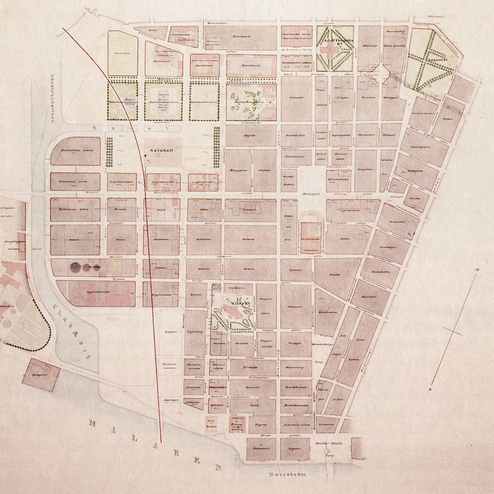 Reglering av västra Norrmalm 1863 enligt ett förslag av A.W. Wallström och A.E. Rudberg